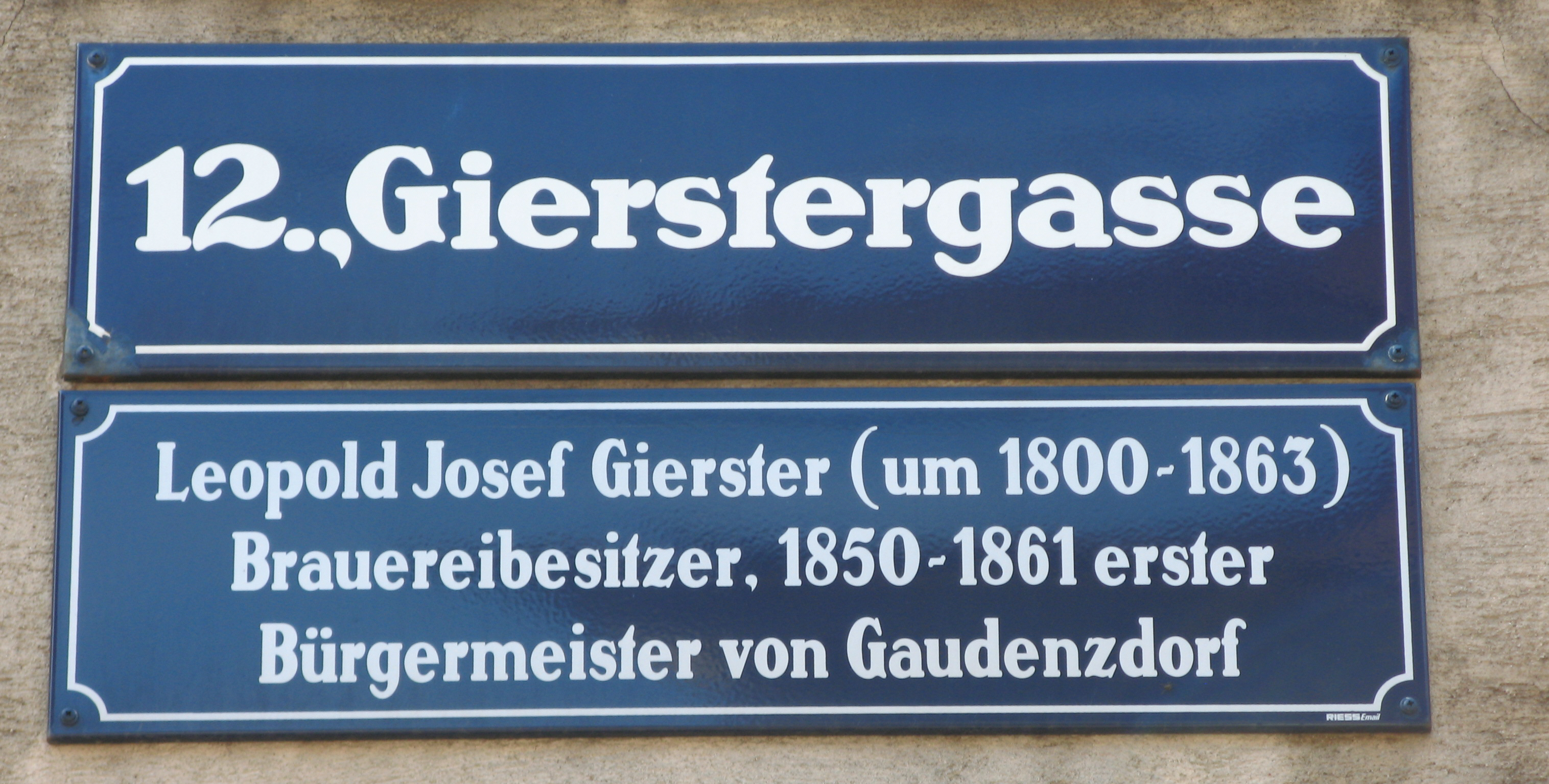 Straßenschild mit Zusatztafel der Gierstergasse in Wien-Meidling